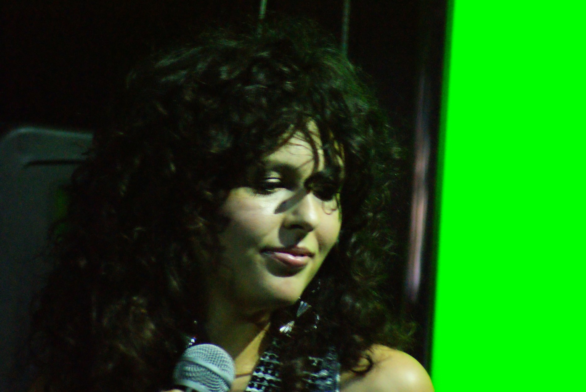 Ramona Rey